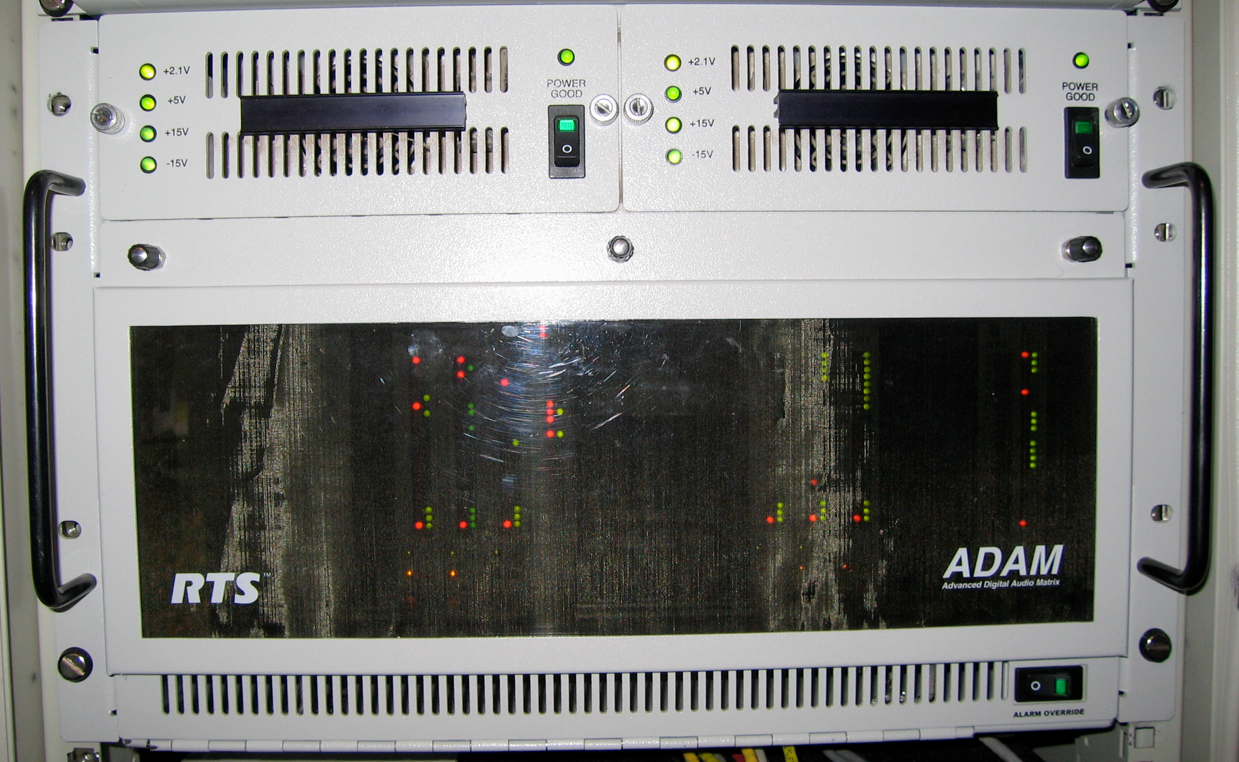 A Telex Adam intercom mainframe.